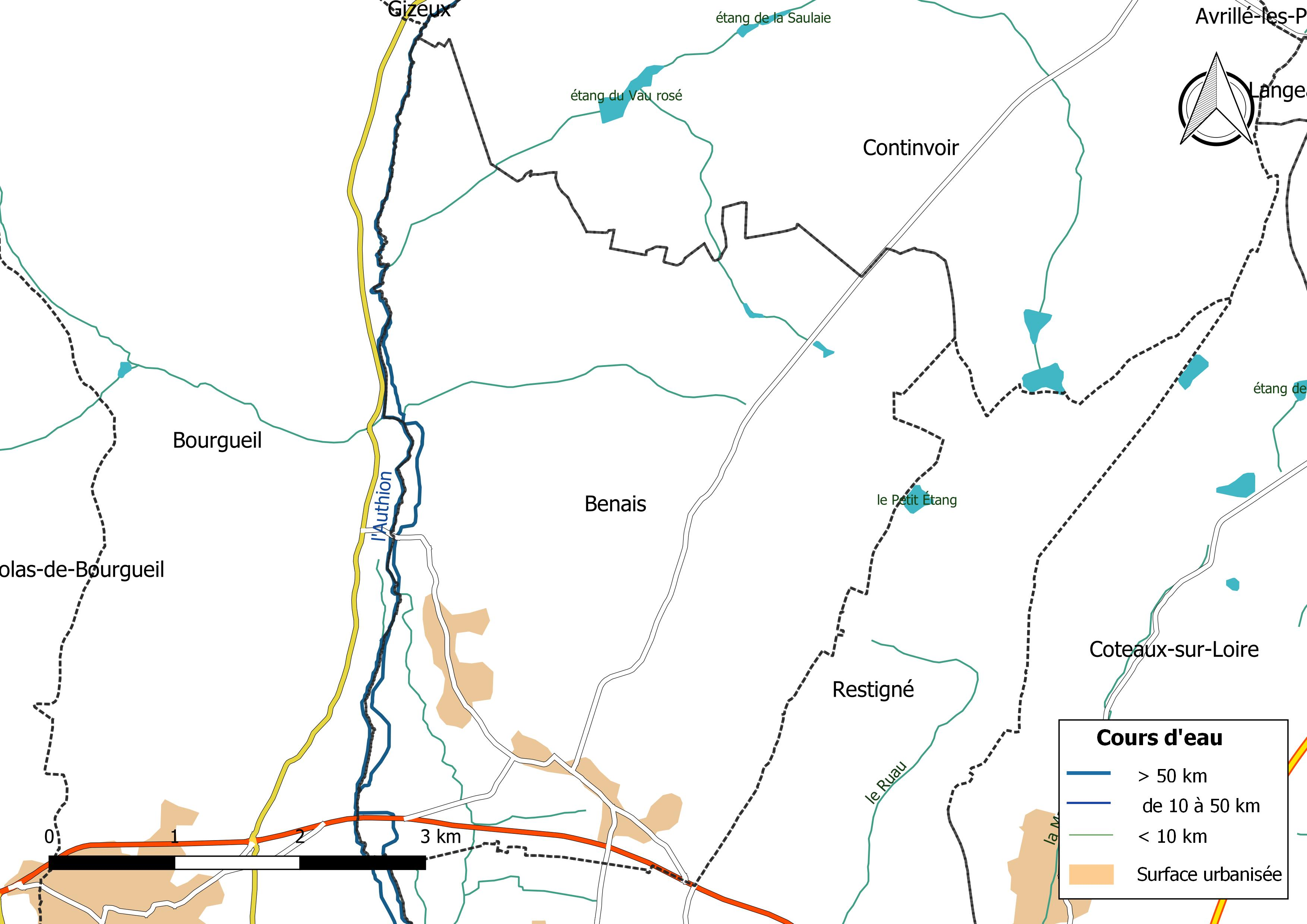 Carte du réseau hydrographique de la commune de Benais (France).